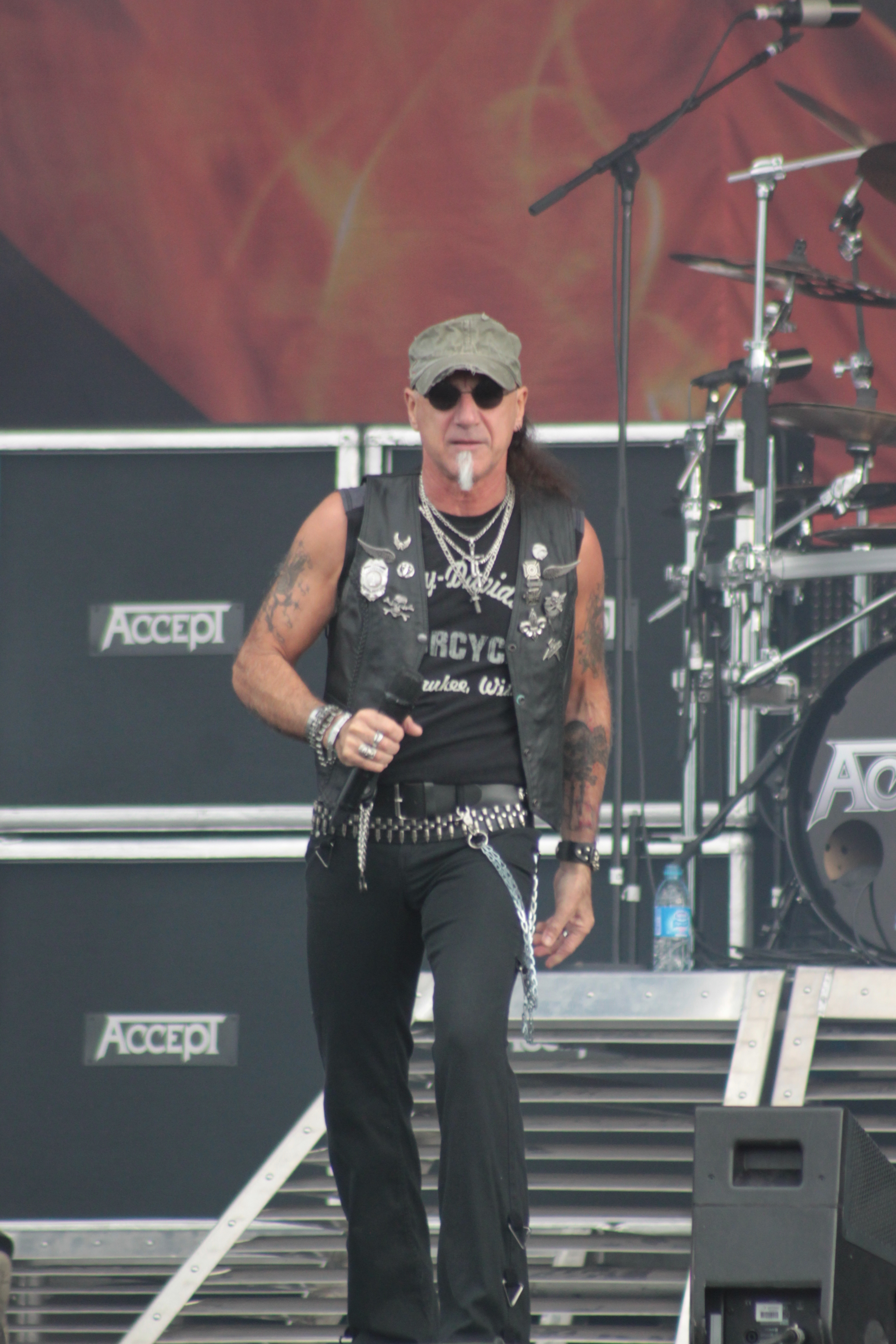 Mark Tornillo, Accept, Helfest 2013, Fr-44-Clisson.